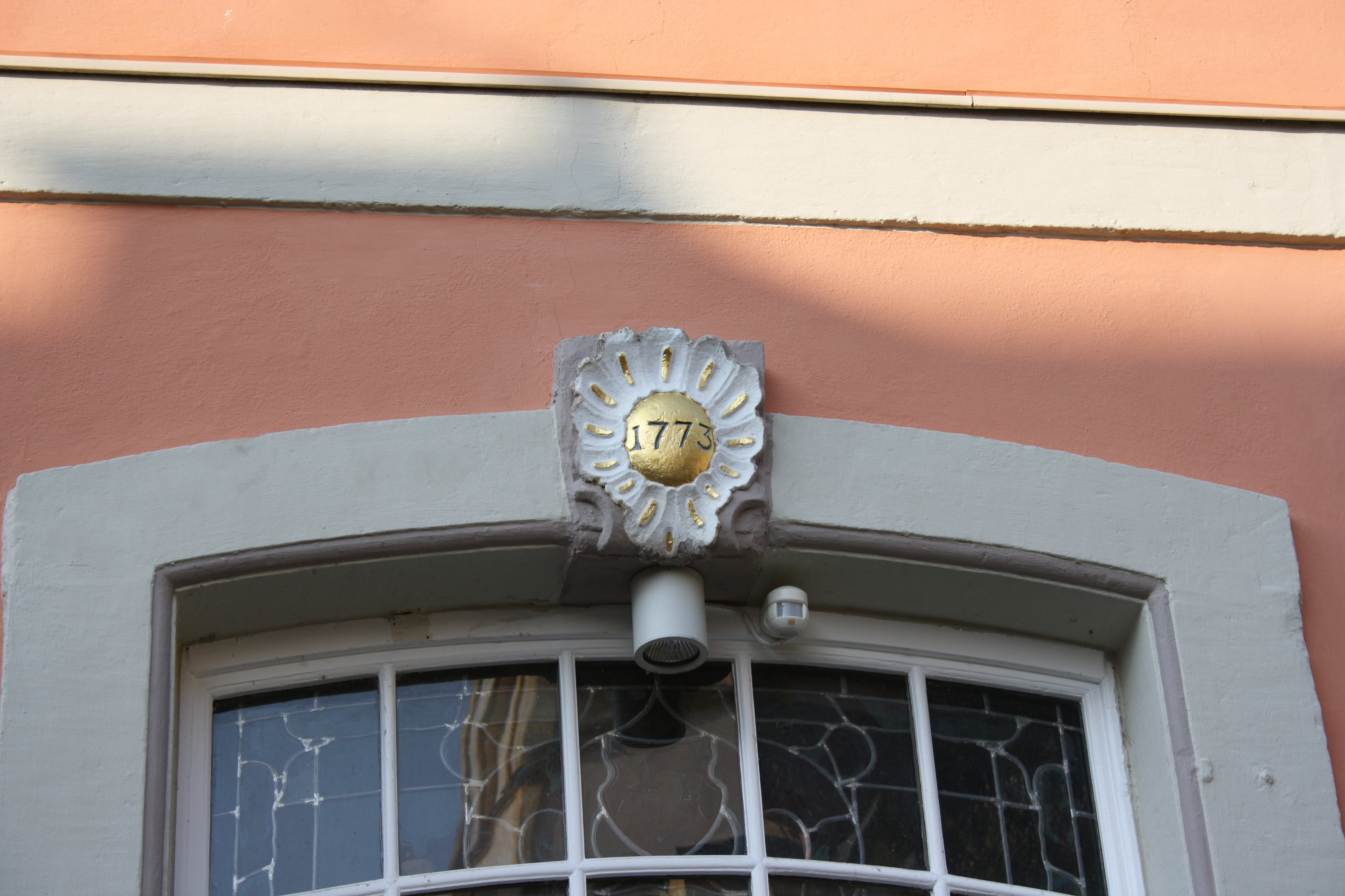 katholisches Pfarrhaus in Ahrweiler, Marktplatz 13